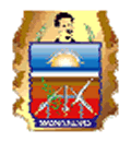 Escudo de Montalvo